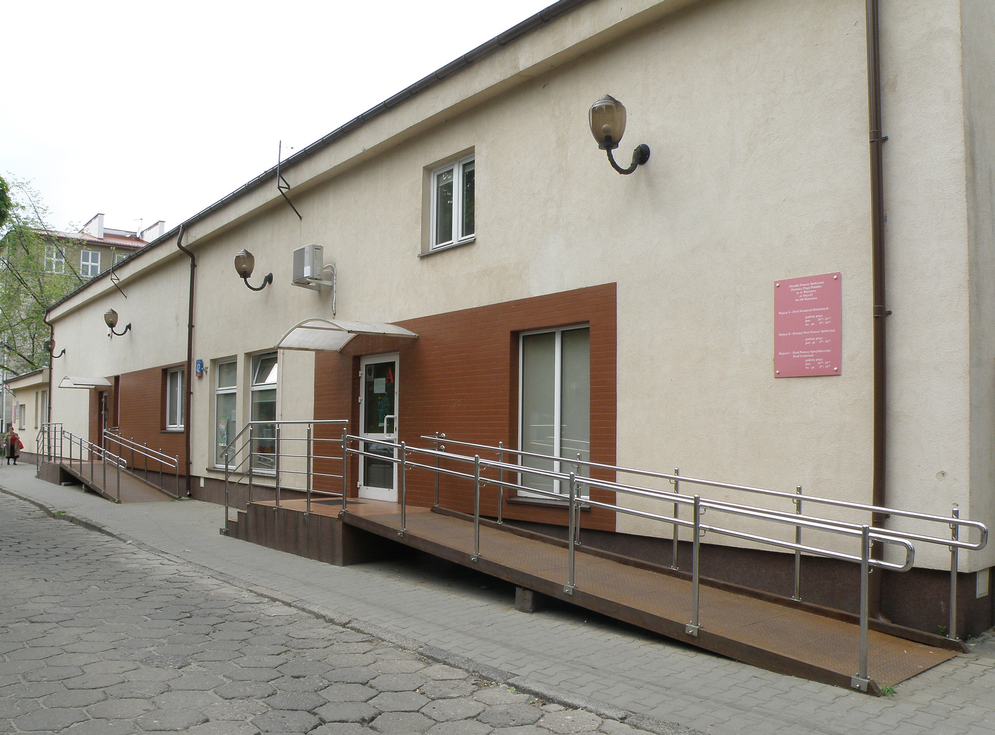 Warszawa, ul. Paca 42 (Praga Południe) - Ośrodek Pomocy Społecznej Dzielnicy Praga Południe m.st. Warszawy